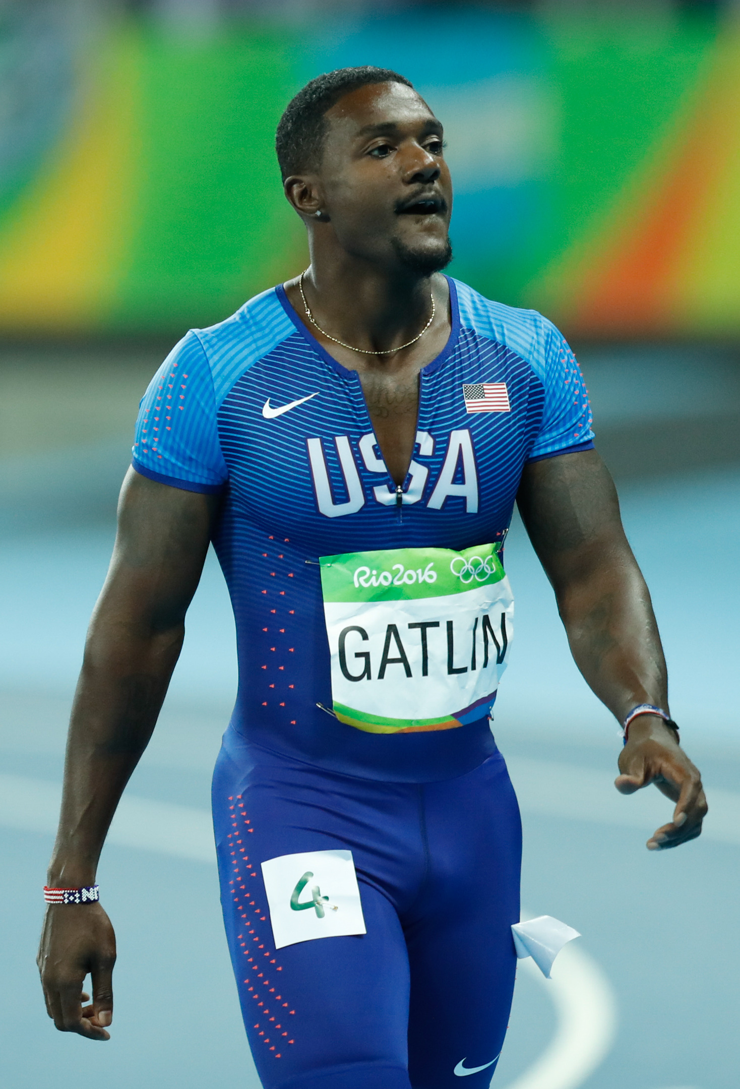 Rio de Janeiro - O jamaicano Usain Bolt, garantiu o ouro e fez história ao conquistar pela terceira vez o título de homem mais rápido do mundo nos 100 metros rasos em uma Olimpíada (Fernando Frazão/Agência Brasil).